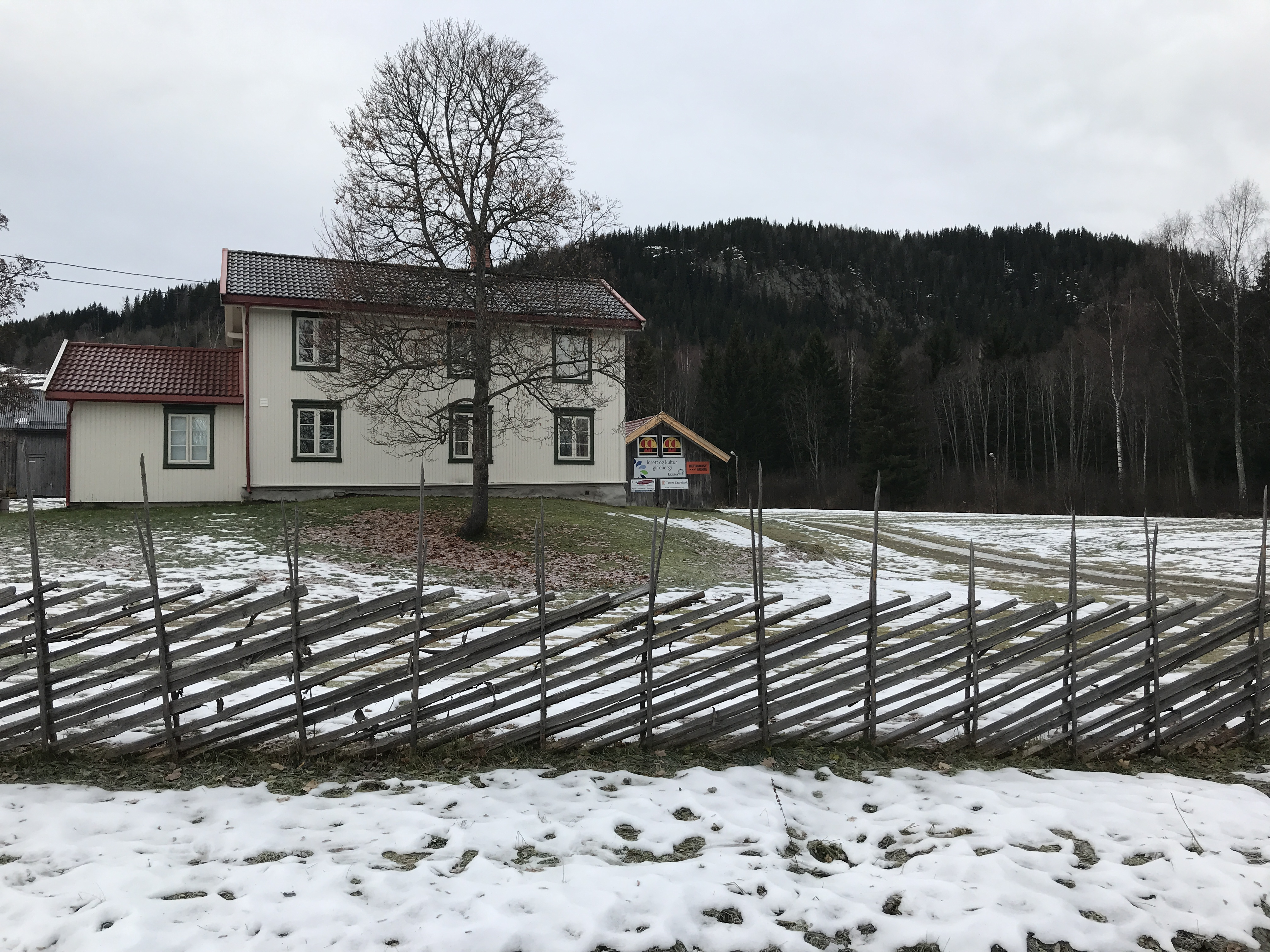 Myrvang, Biri idrettslags langrennsstadion og fotballbaner.